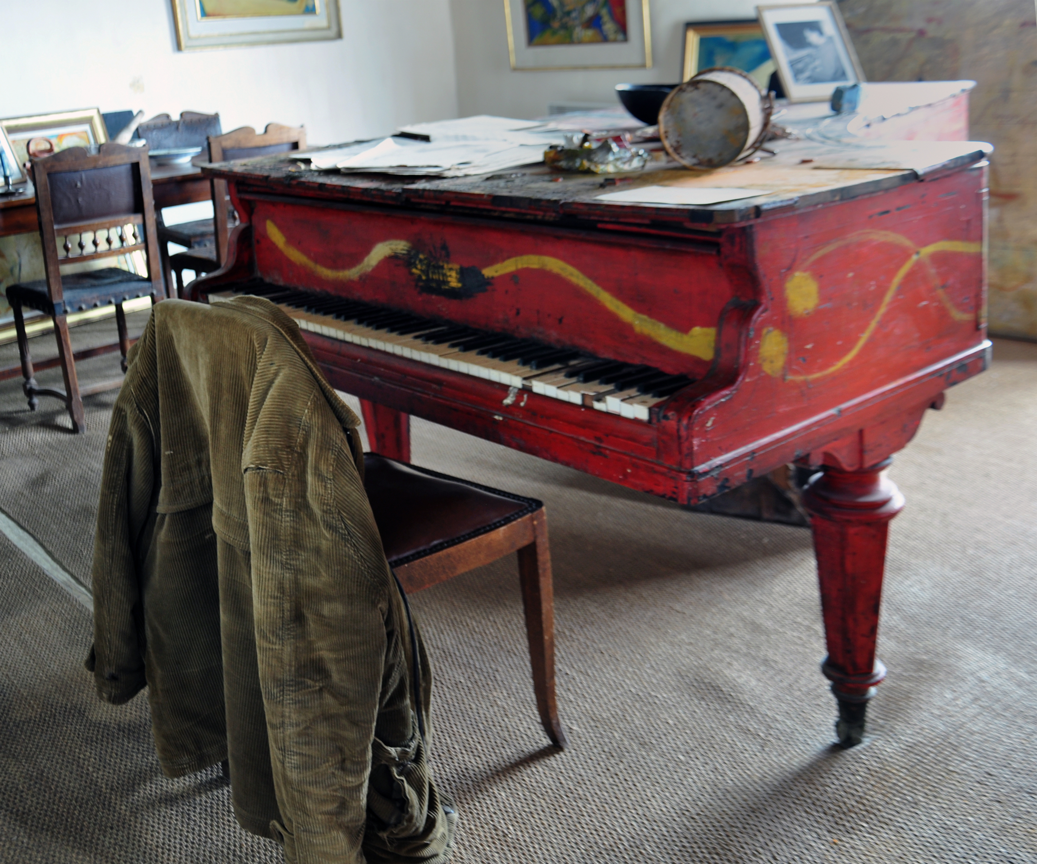 L'atelier du peintre dans le château-musée de Cabriès-en-Provence